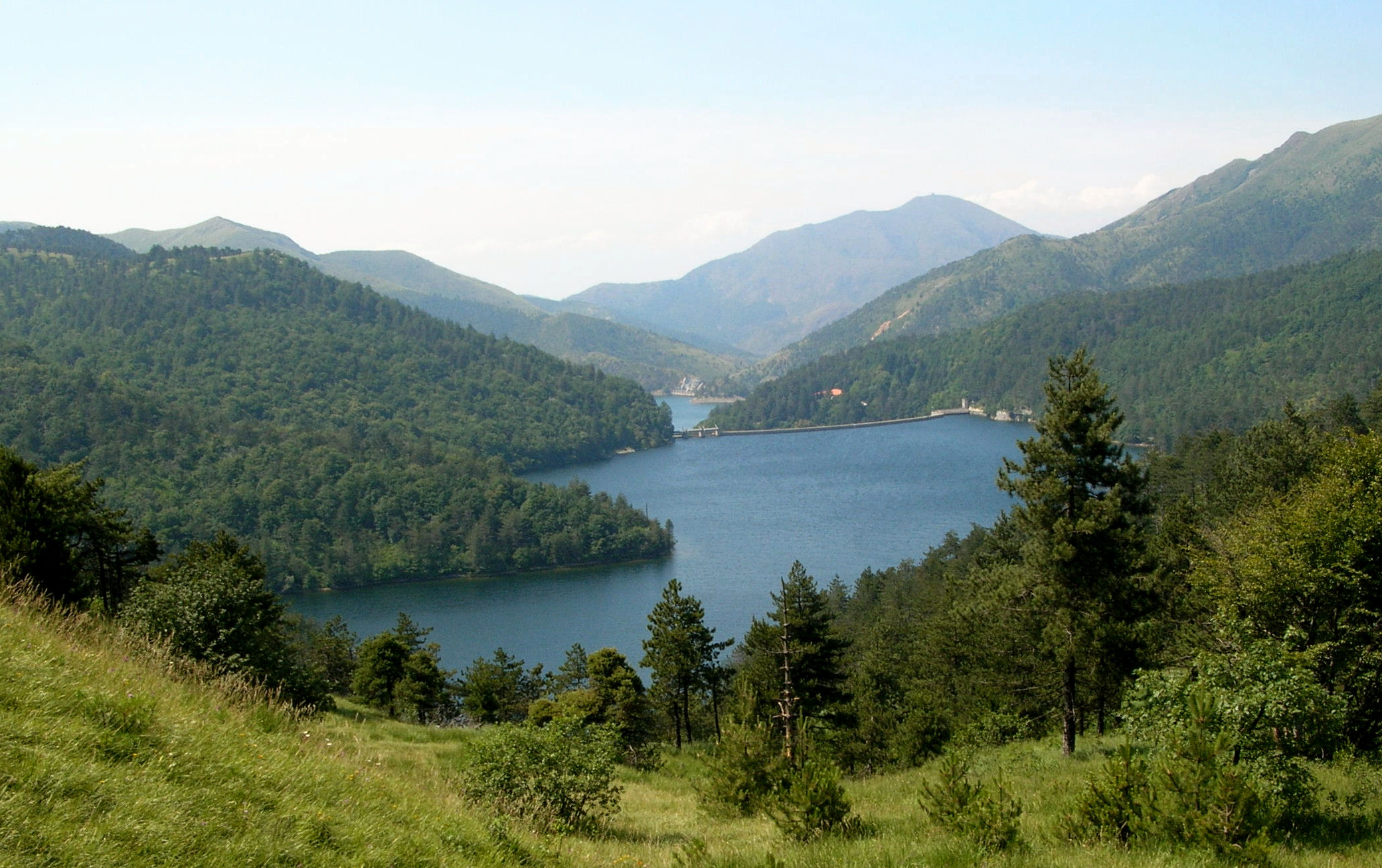 Foto propria Giugno 2007 Laghi Gorzente (Lago Lungo e Lago Bruno)